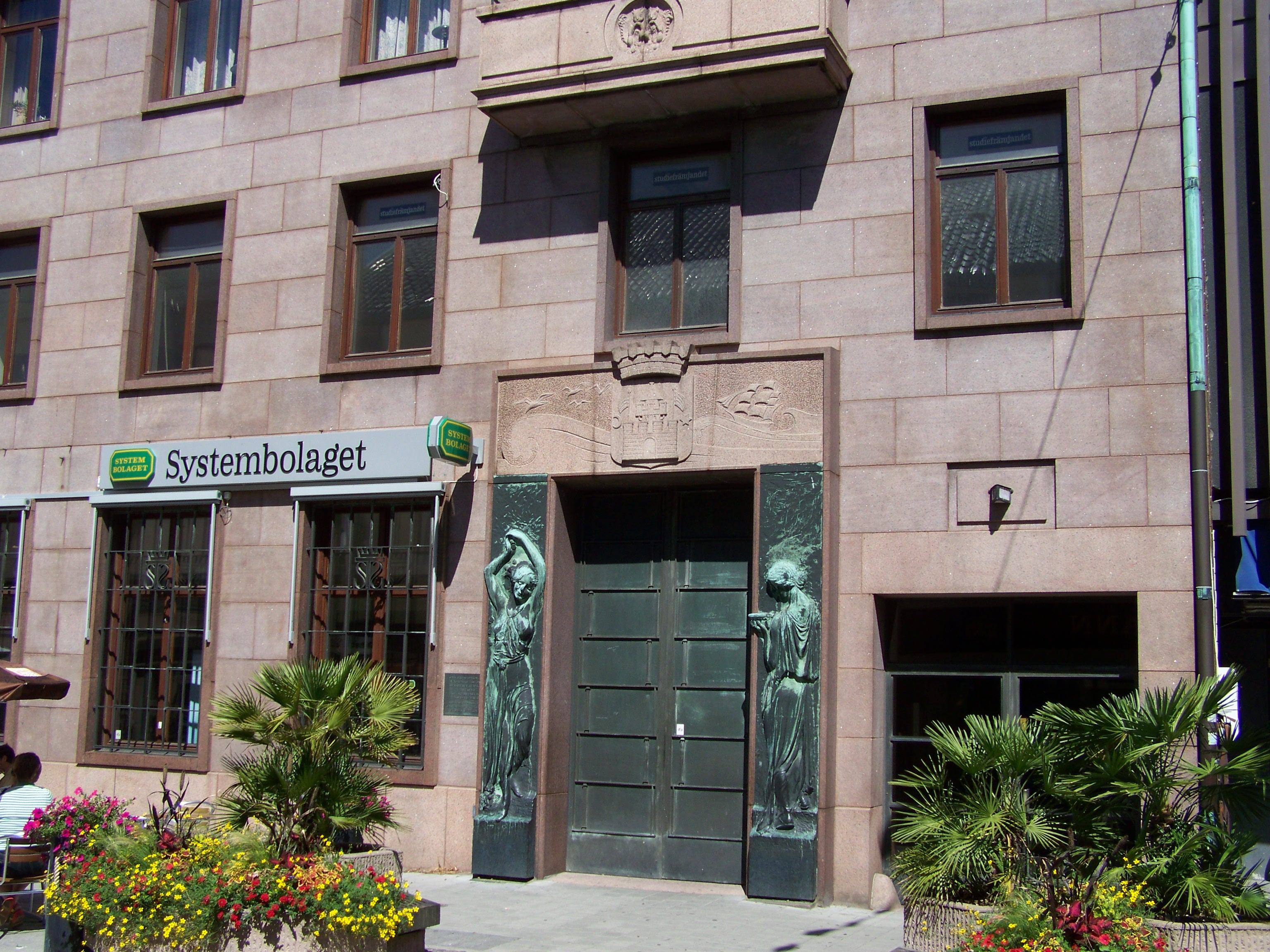 F.d. Trelleborgs sparbank. Arkitekt: August Ewe 1933-1935